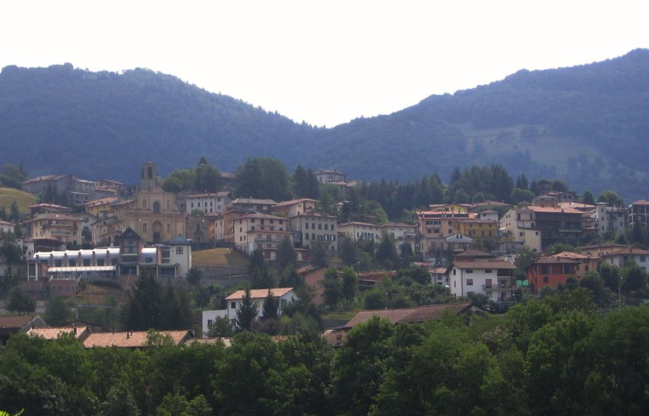 Peia, Bergamo, Italy